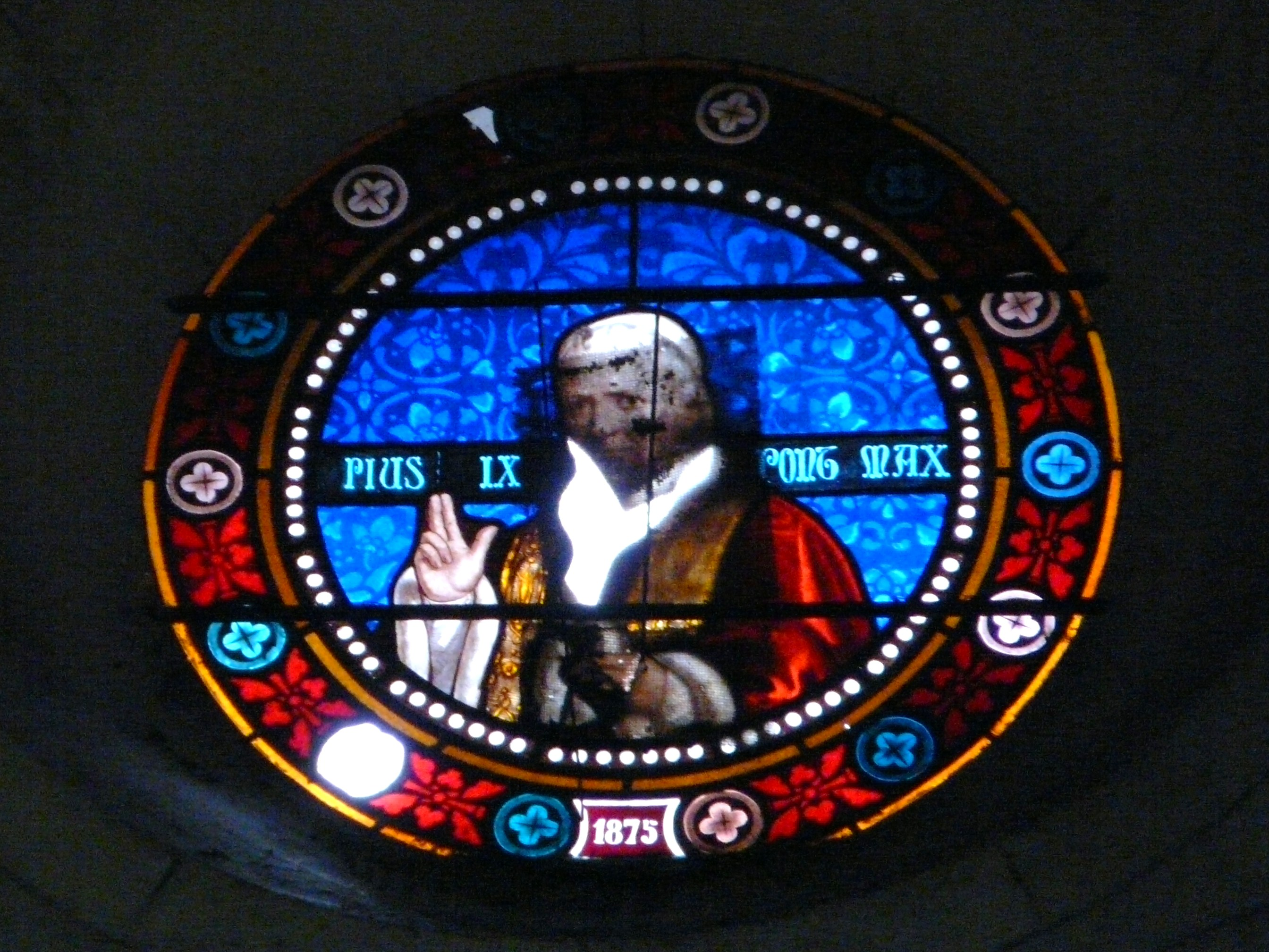 Vitrail de 1875 représentant le Pape Pie IX, église Saint-Jean-Baptiste, Boulazac, Dordogne, France